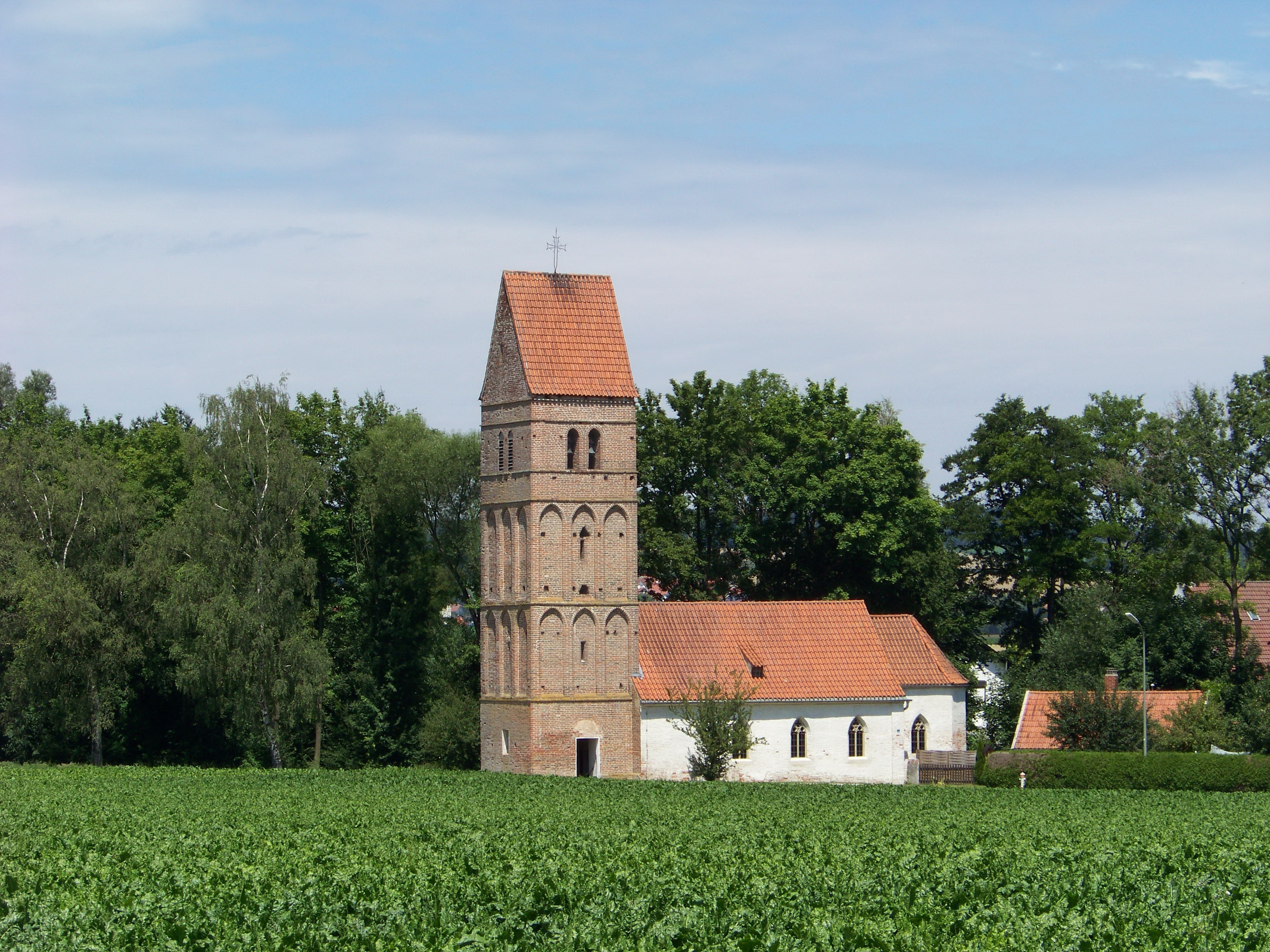 Essenbach, Altheim. Kath. Kirche St. Andreas. Spätgotische Anlage um 1490; mit Ausstattung.